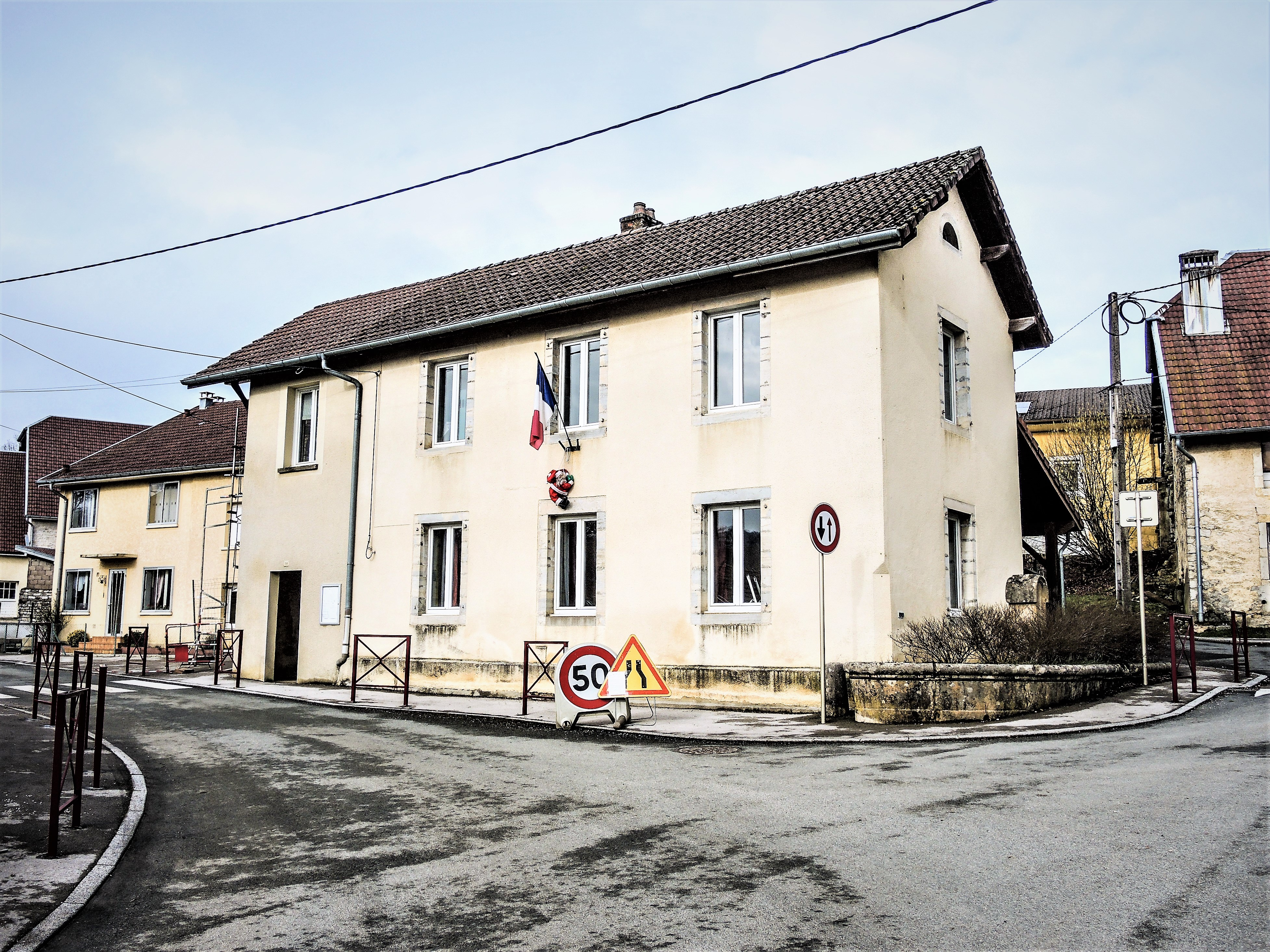 Mairie de Faimbe